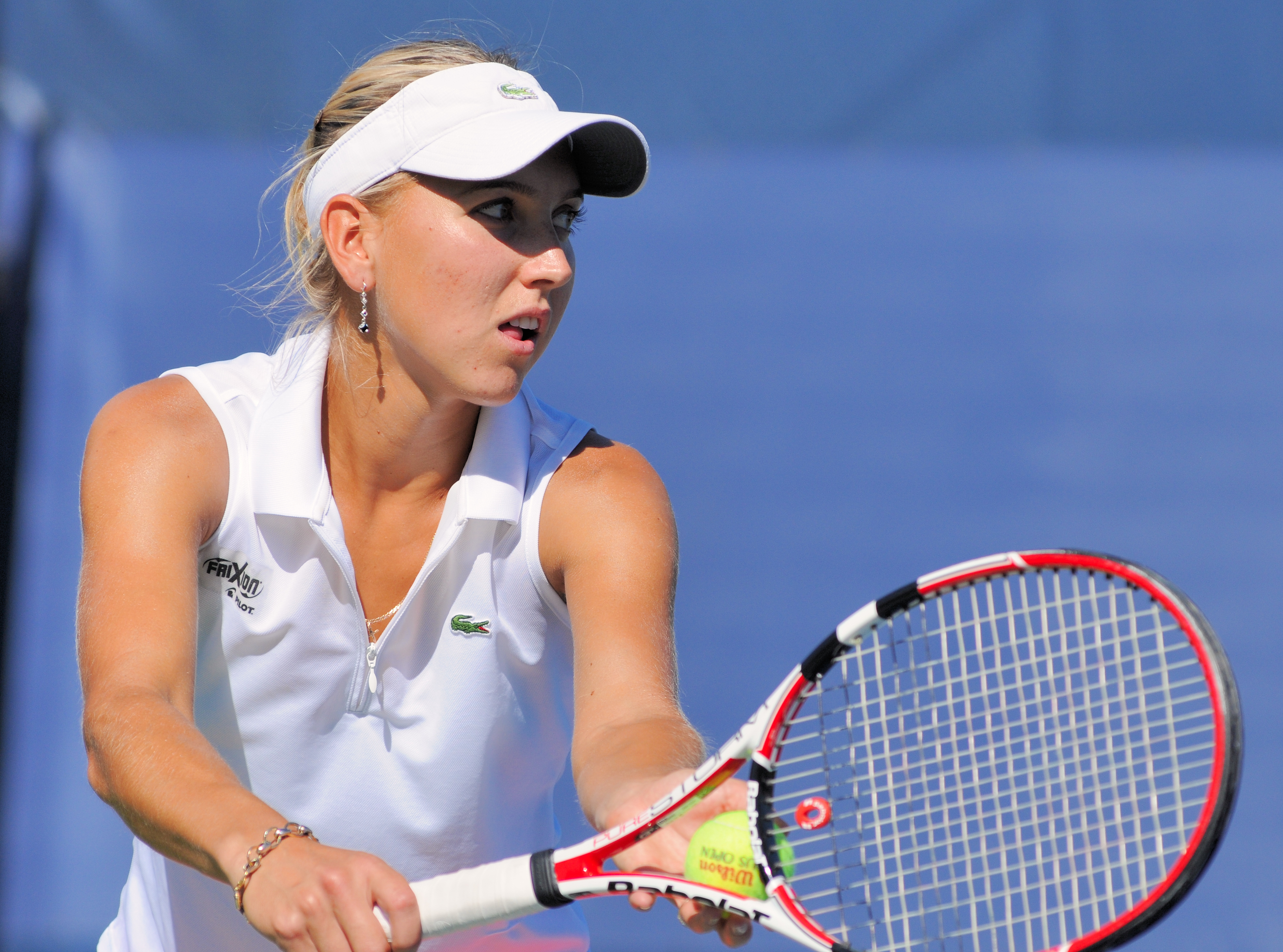 Elena Vesnina - US Open 2010